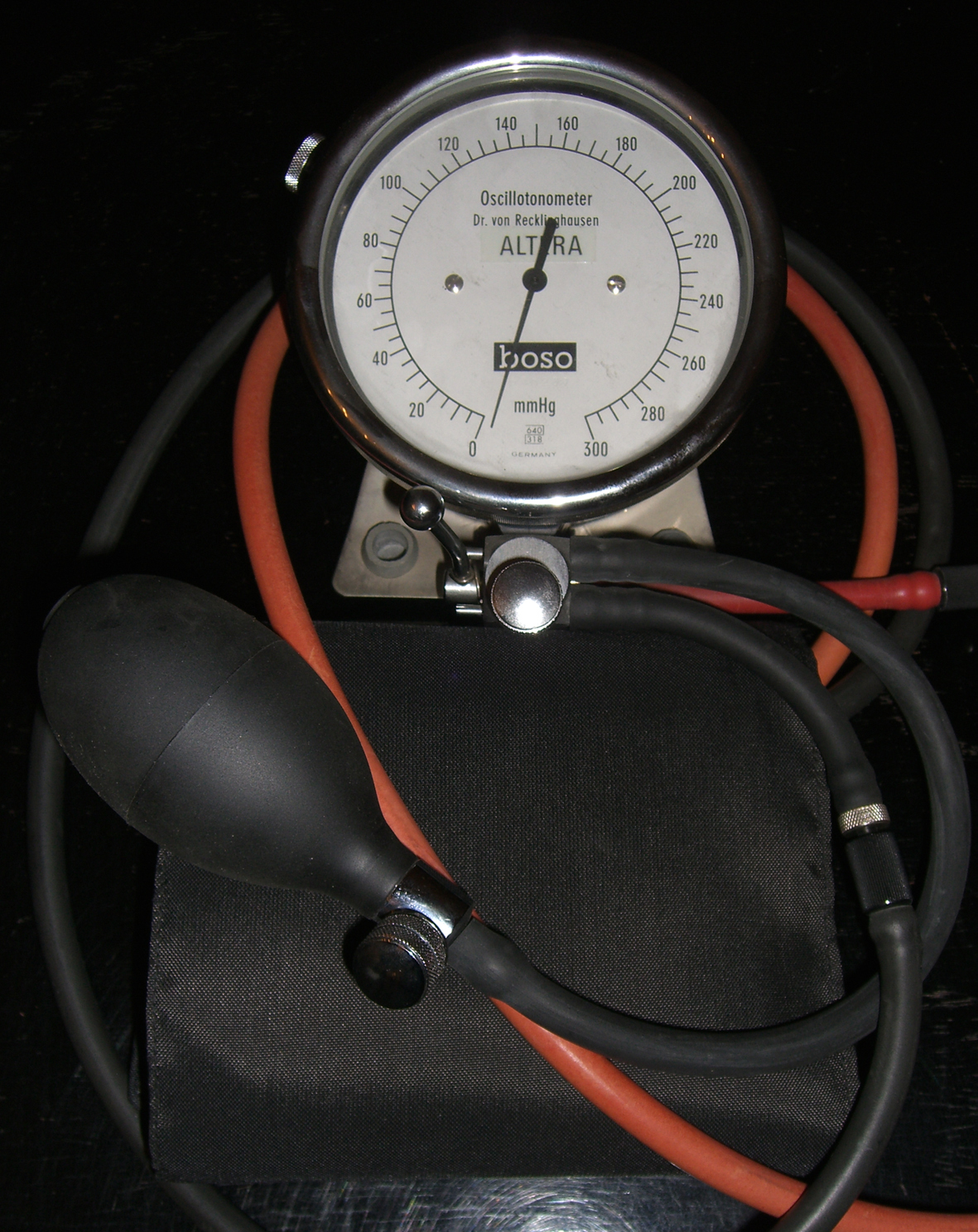 Oscillotonometer nach Dr. Heinrich von Recklinghausen: hochpräzises mechanisches Gerät zur oszillometrischen Blutdruckmessung mit der nach seinen Vorgaben entwickelten Doppelbeutelmanschette (Baujahr ca. 1990)